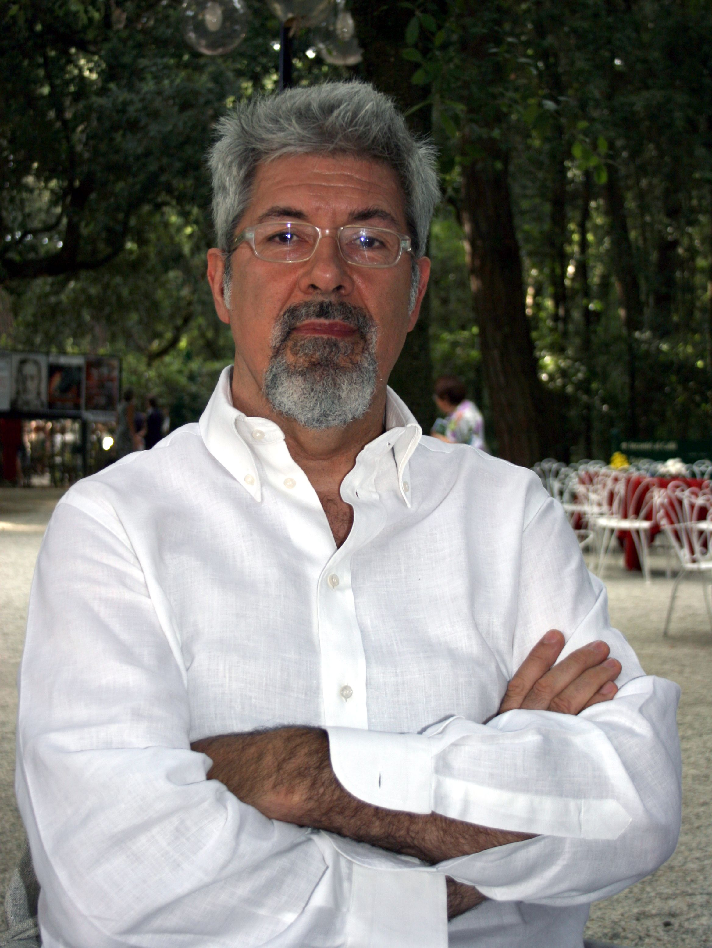 Il regista, attore e drammaturgo italiano Alessandro Benvenuti